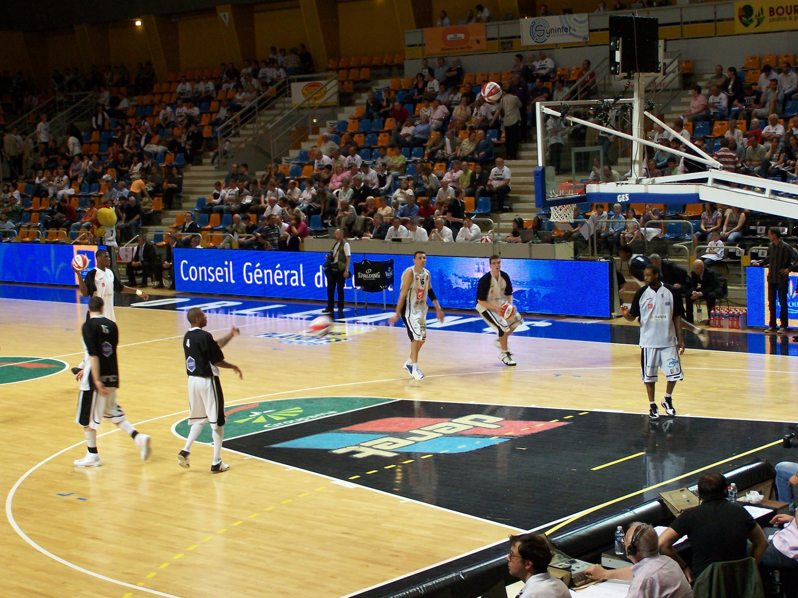 L'Entente Orléanaise Loiret à l'échauffement avant le match de quart de finale des play-offs contre Châlons, le 23 mai 2009.